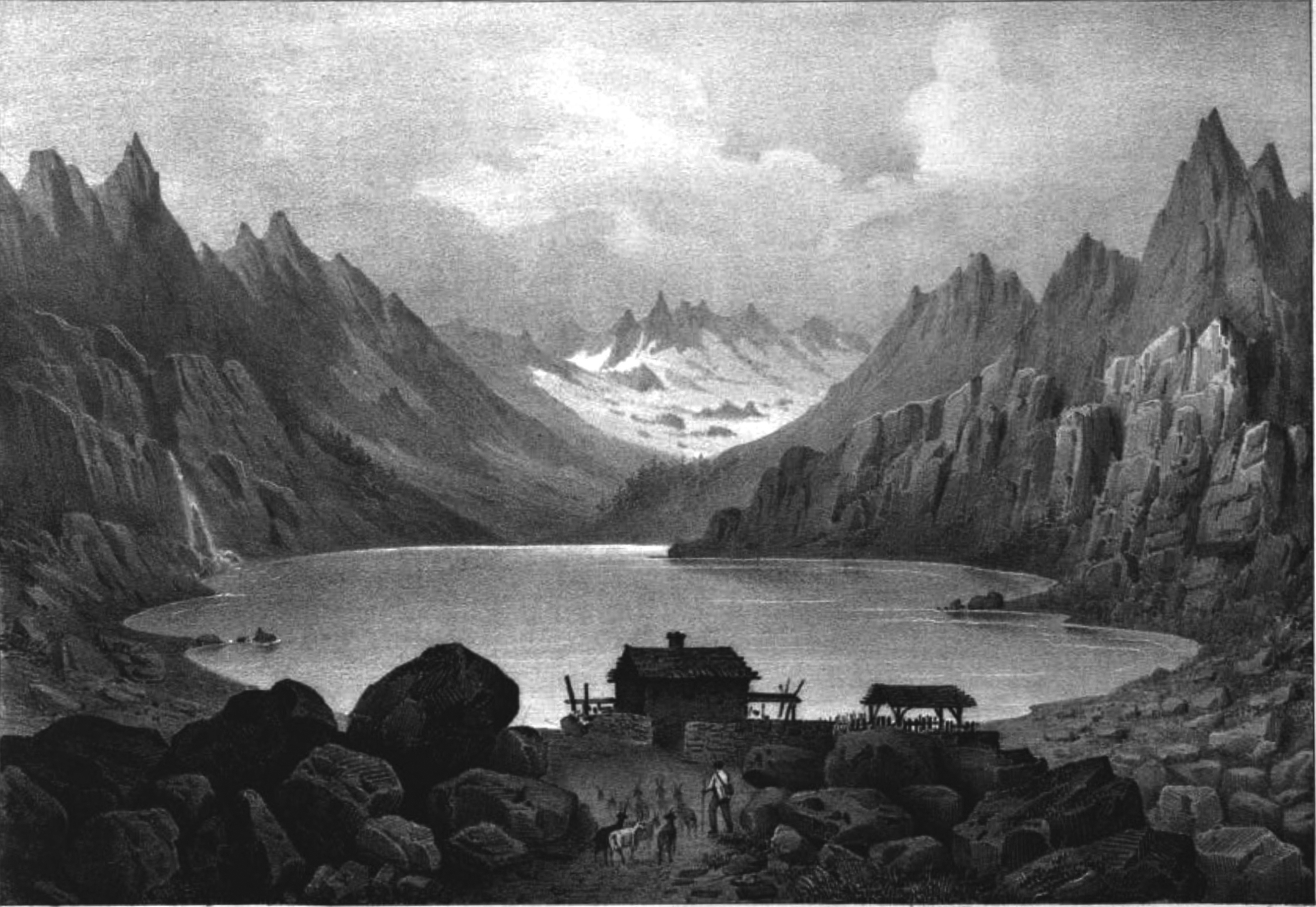 Lac Lauvitel, Isère